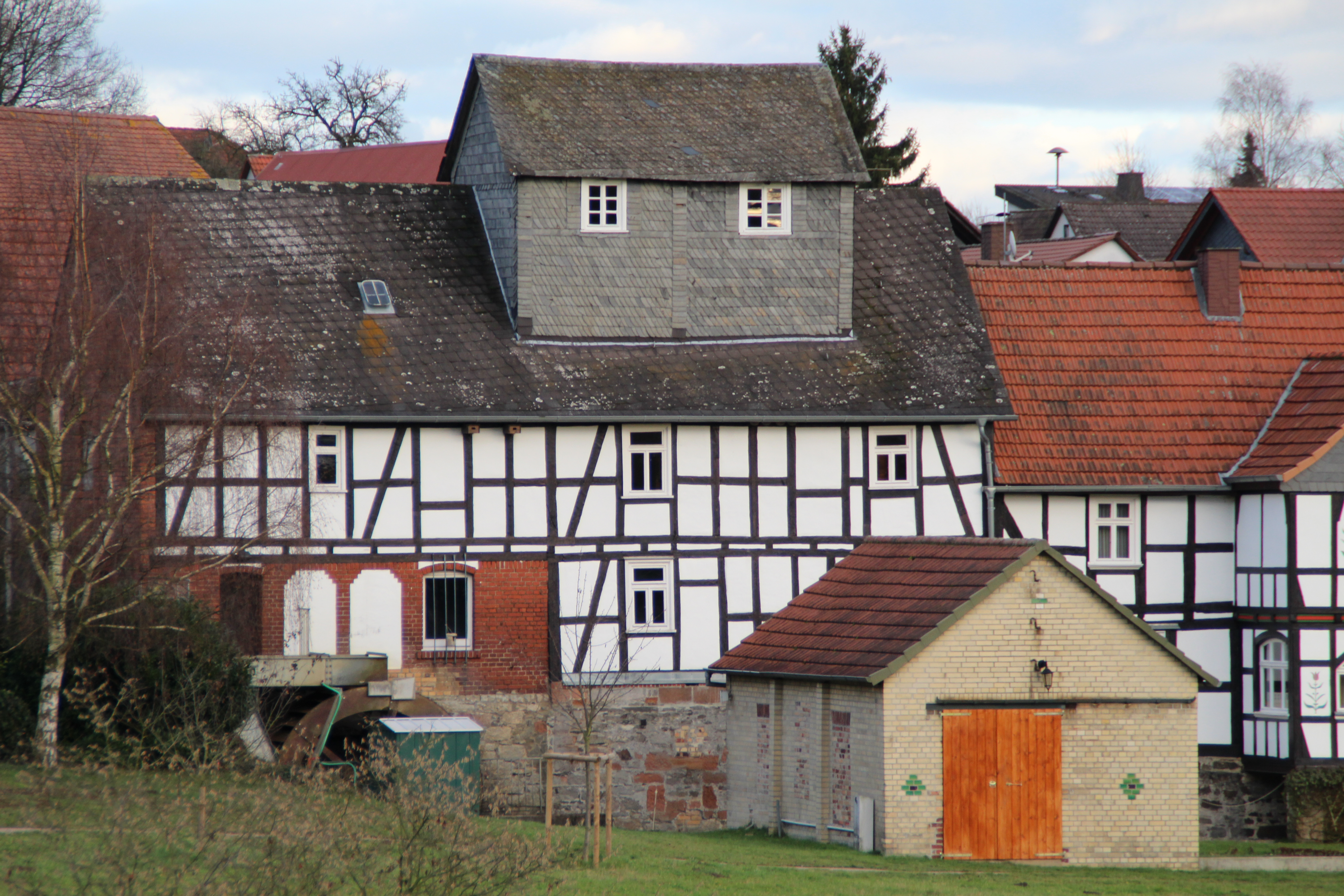 Wassermühle in Damm (Salzbödestraße 6, 35102 Lohra)